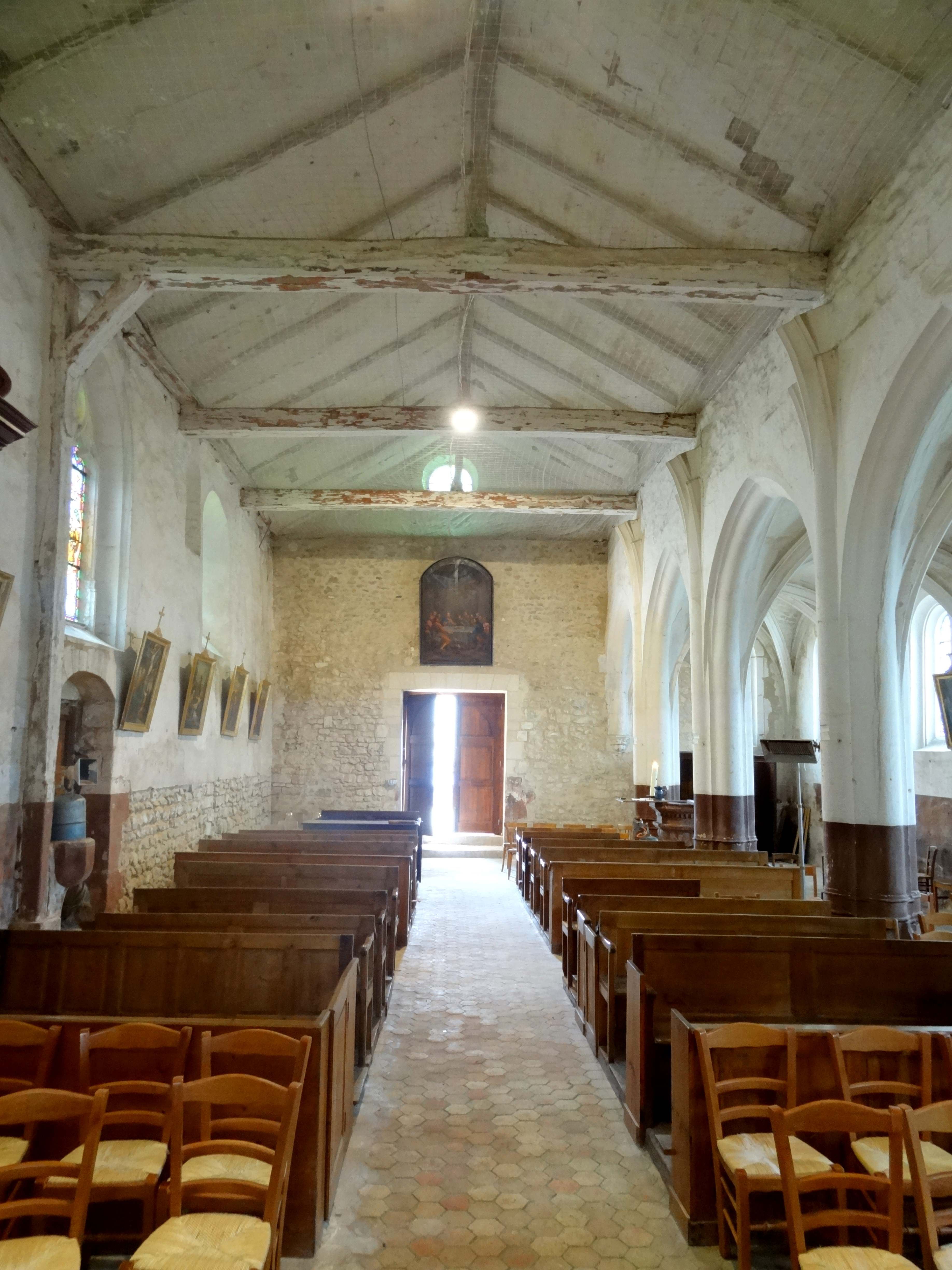 Intérieur de l'église - voir titre.